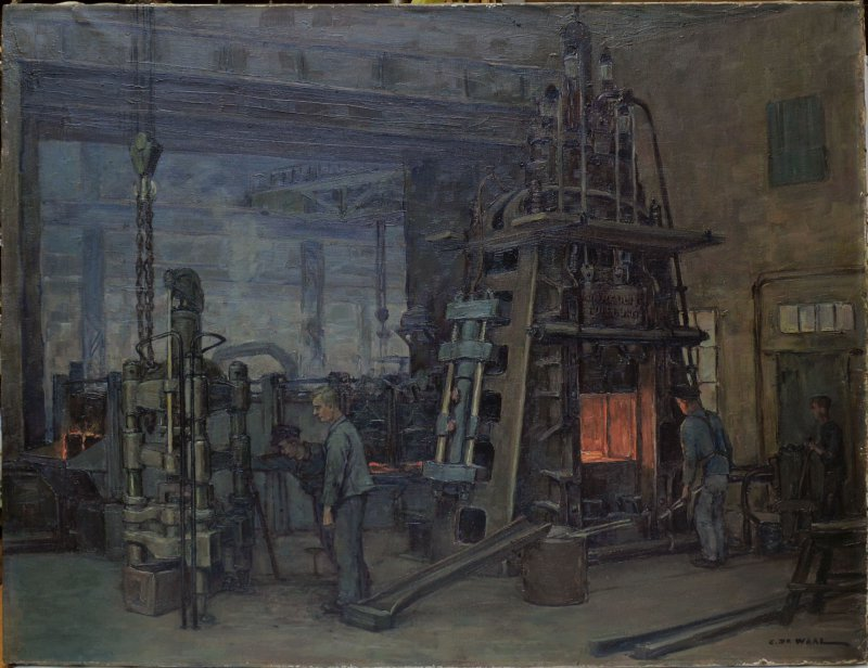 Cornelis de Waal Industrieschmiede Duisburg